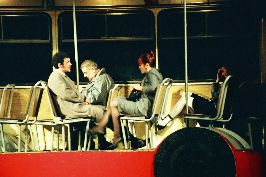 Nebojša Glogovac u predstavi Bure Baruta